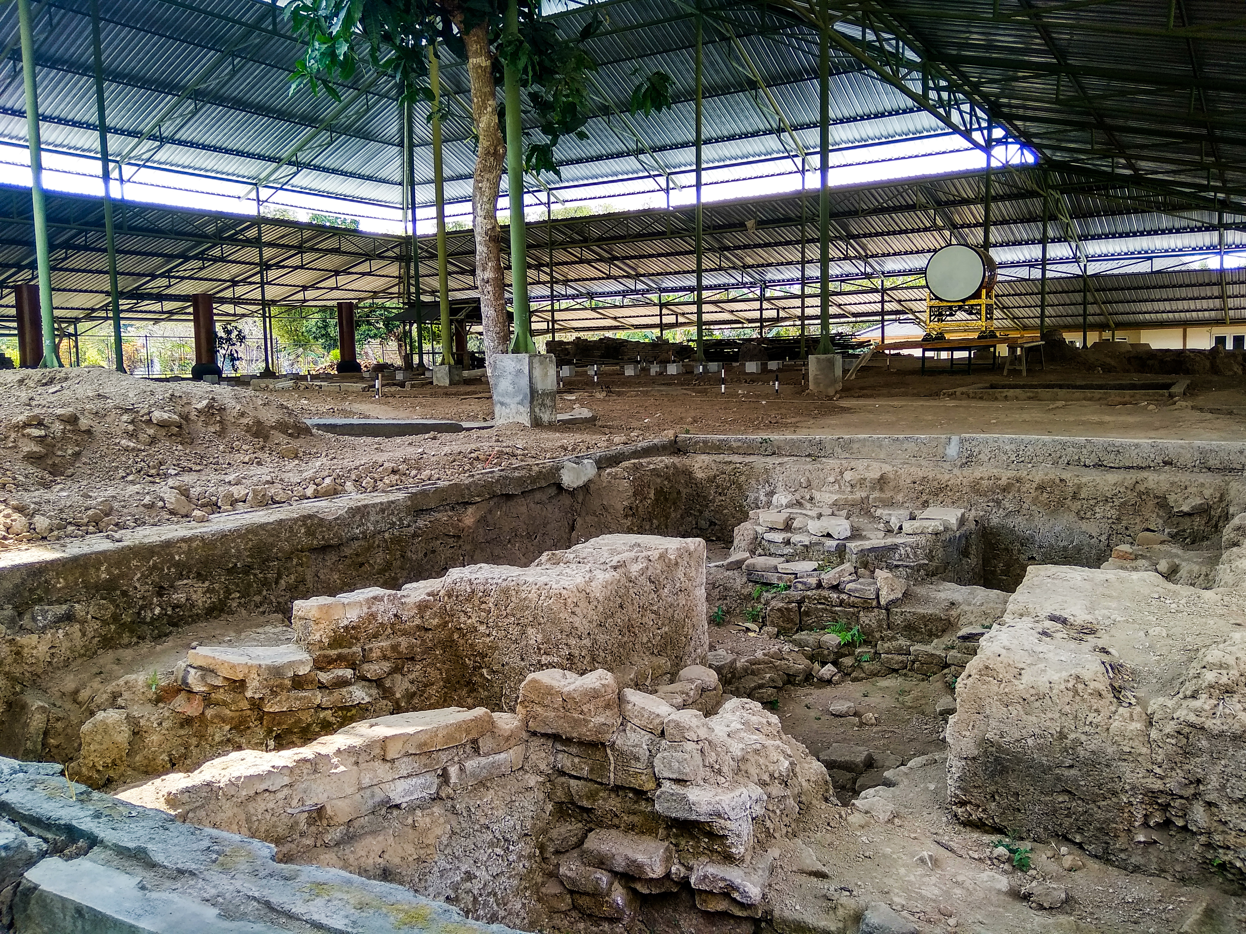 Menurut catatan Lons yang ditulis oleh Leemans pada tahun 1855, pada kunjungannya tanggal 13 Agustus 1733, terlihat bahwa Masjid Agung Kauman Pleret yang sudah tersebut berukuran besar, berbentuk segi empat, mempunyai pintu di sebelah timur dan serambi depan yang besar, serta dikelilingi tembok tebal dan tinggi.